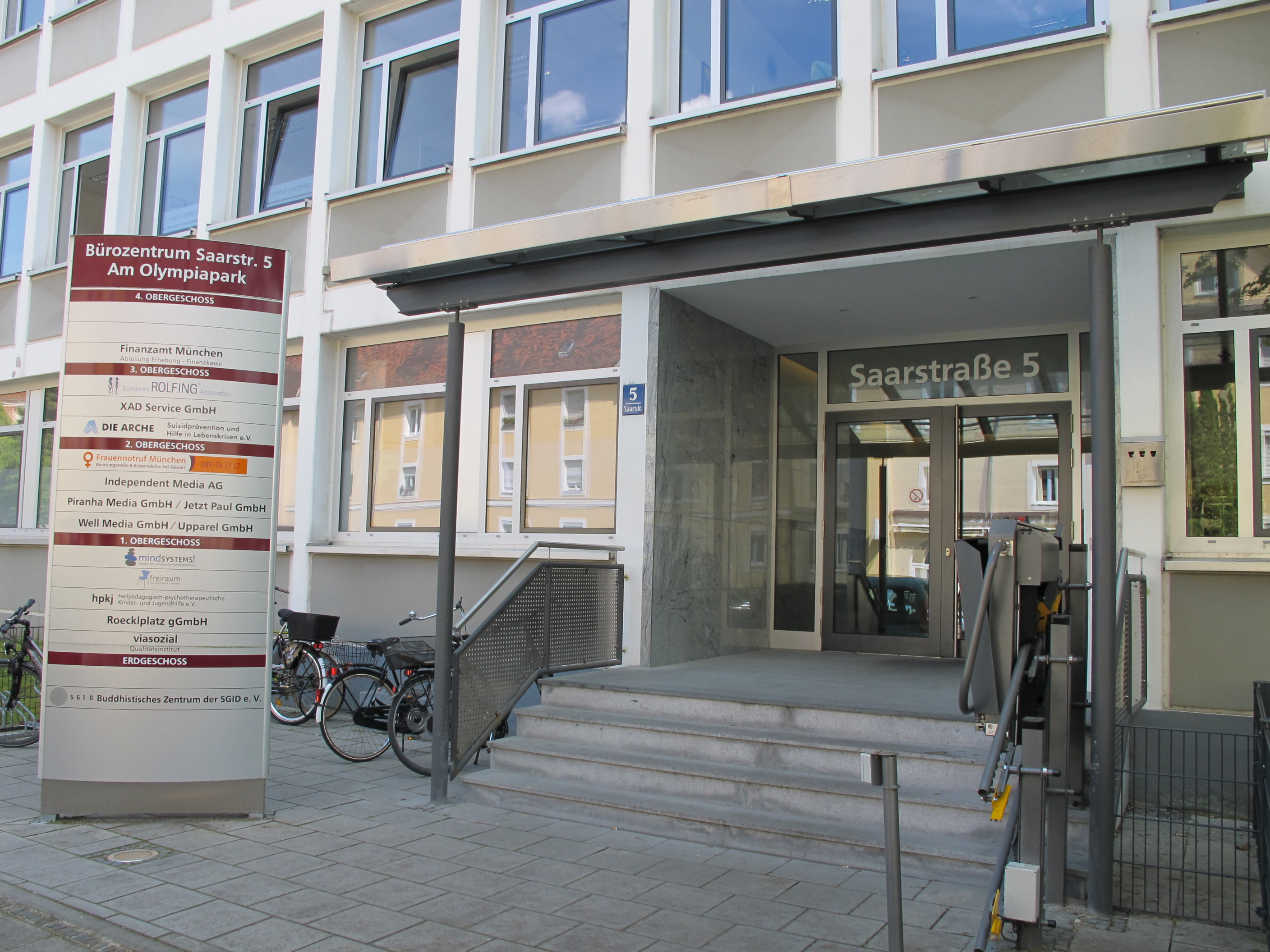 Eingangsbereich der Beratungsstelle Die Arche